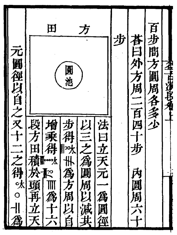 益古演段第八问